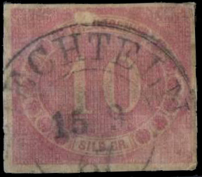 Почтовая марка Пруссии, 1866